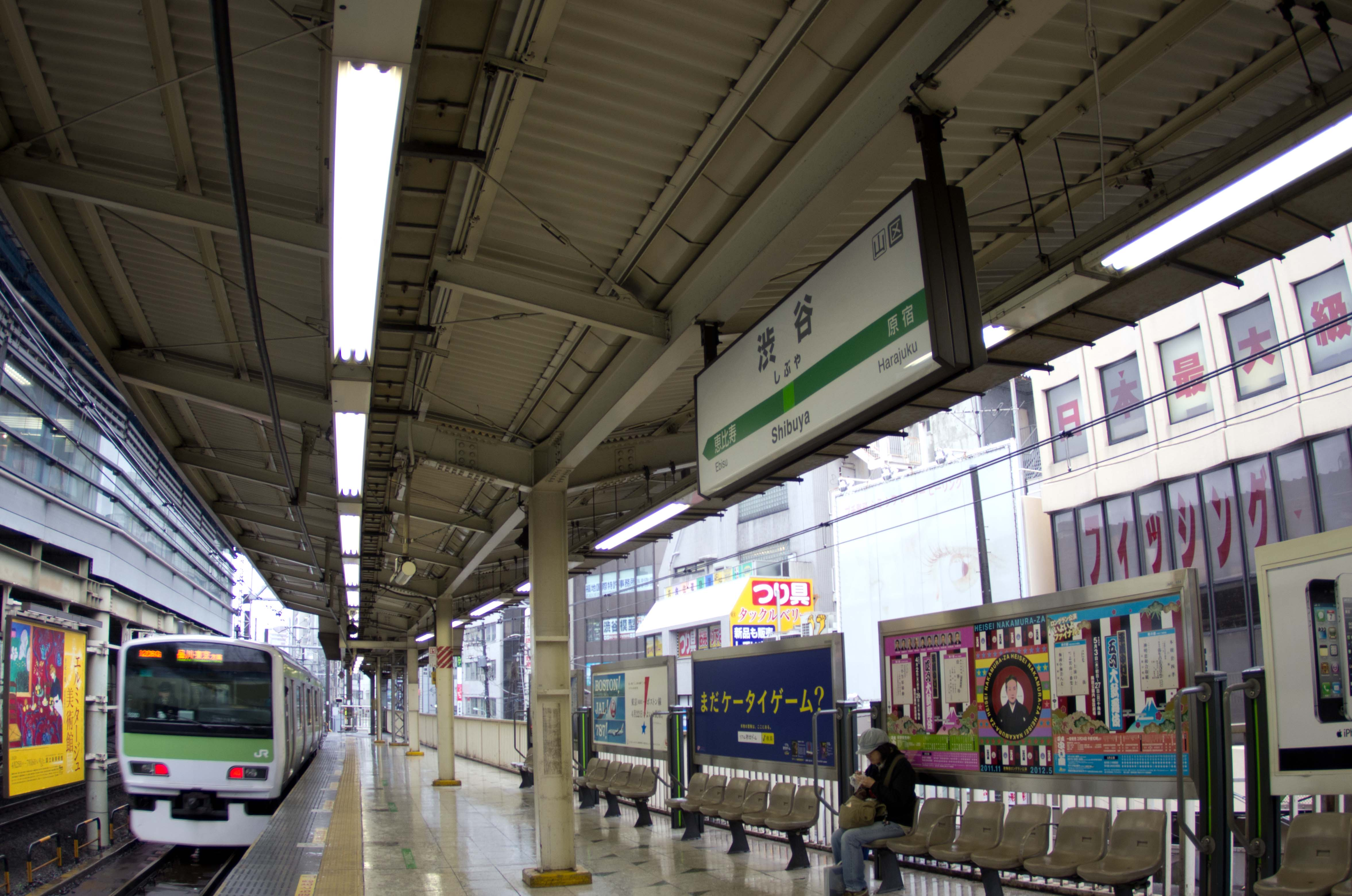 渋谷駅 Shibuya Station